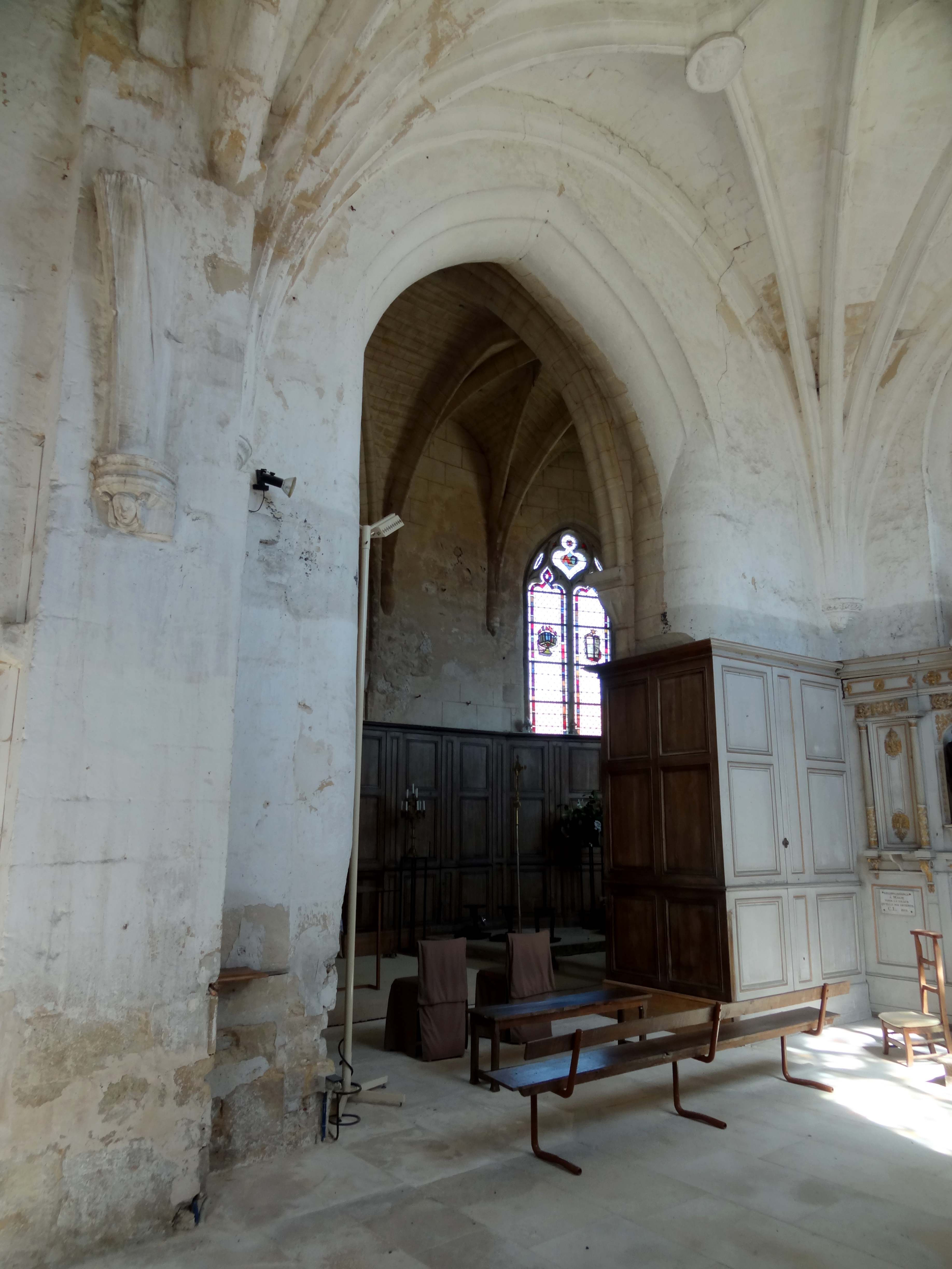 Intérieur de l'église - voir titre.